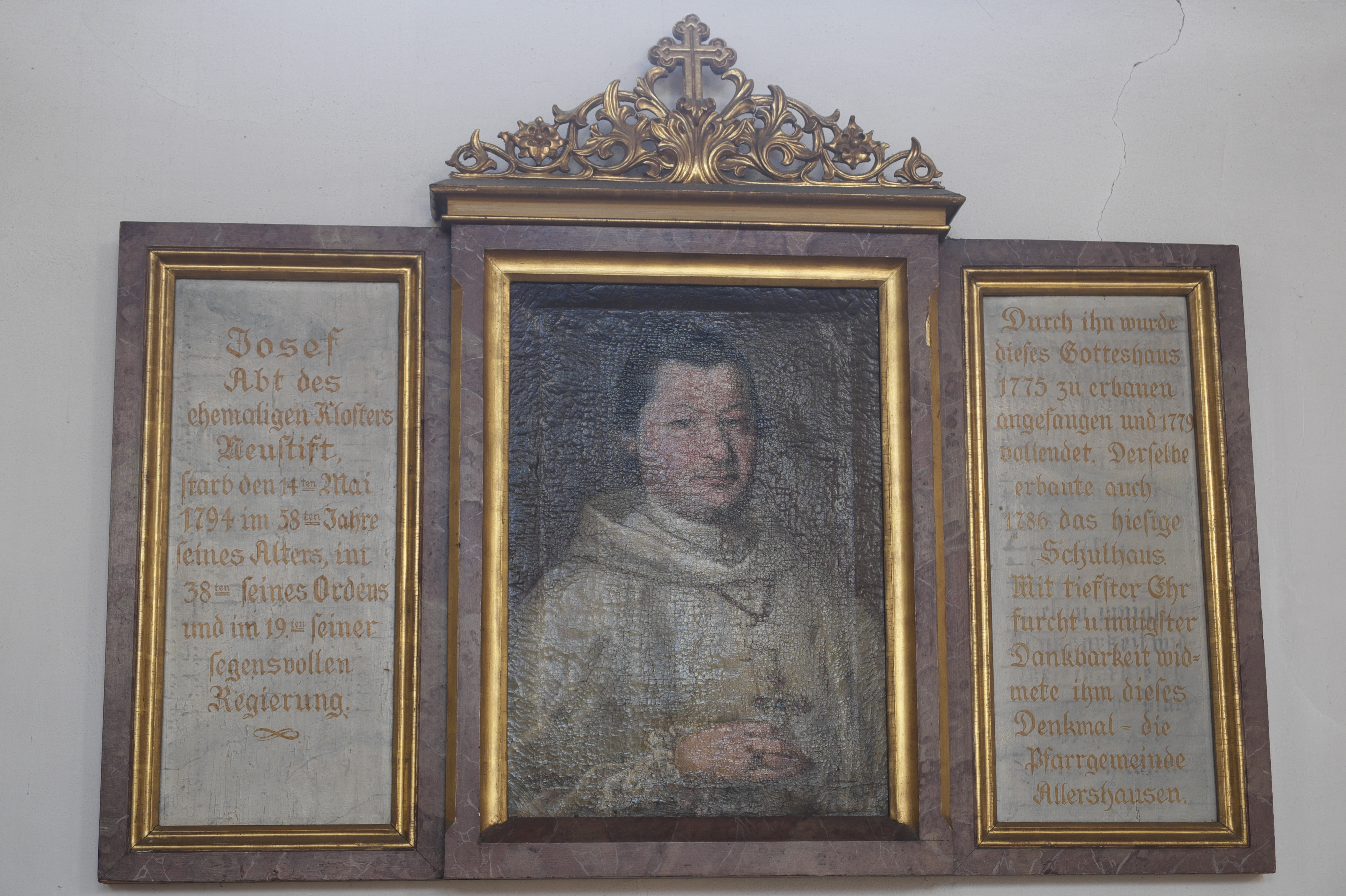 Katholische Pfarrkirche St. Joseph in Allershausen im Landkreis Freising (Bayern/Deutschland), Abt Joseph Gaspar von Kloster Neustift (1775–1794)